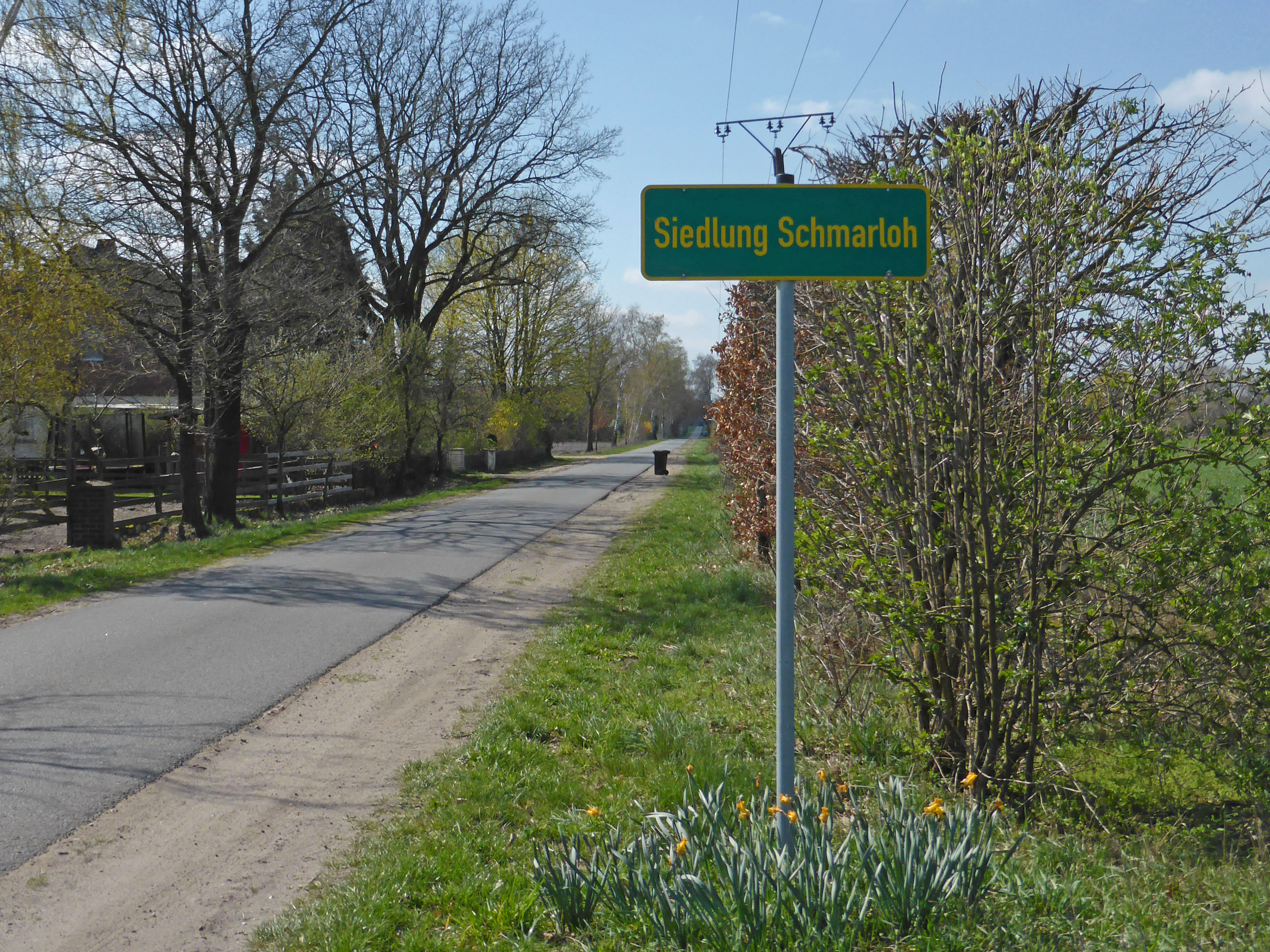 Östlicher Ortseingang der Siedlung Schmarloh.